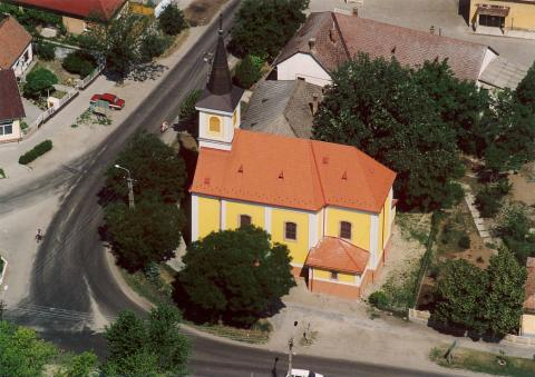 Bugyi, Hungary, aerial photography. Szent Adalbert római katolikus templom